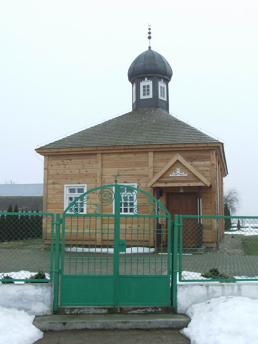 Meczet w Bohonikach, zima 2007